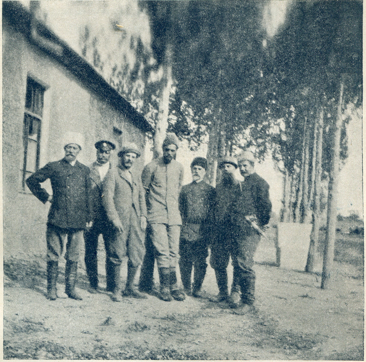 Великий князь Сергей Михайлович Романов (в центре) и егермейстер Михаил Владимирович Андреевский (третий слева) на охоте в Караязах в 1902 году